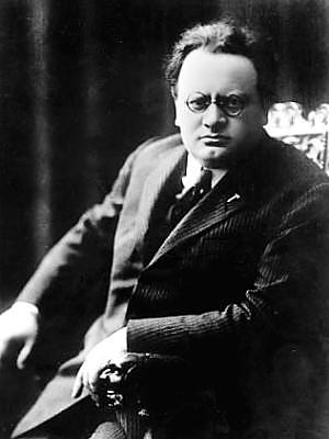 Arnaldo Mussolini (1885 - 1931), fratello di Benito, negli anni '20.